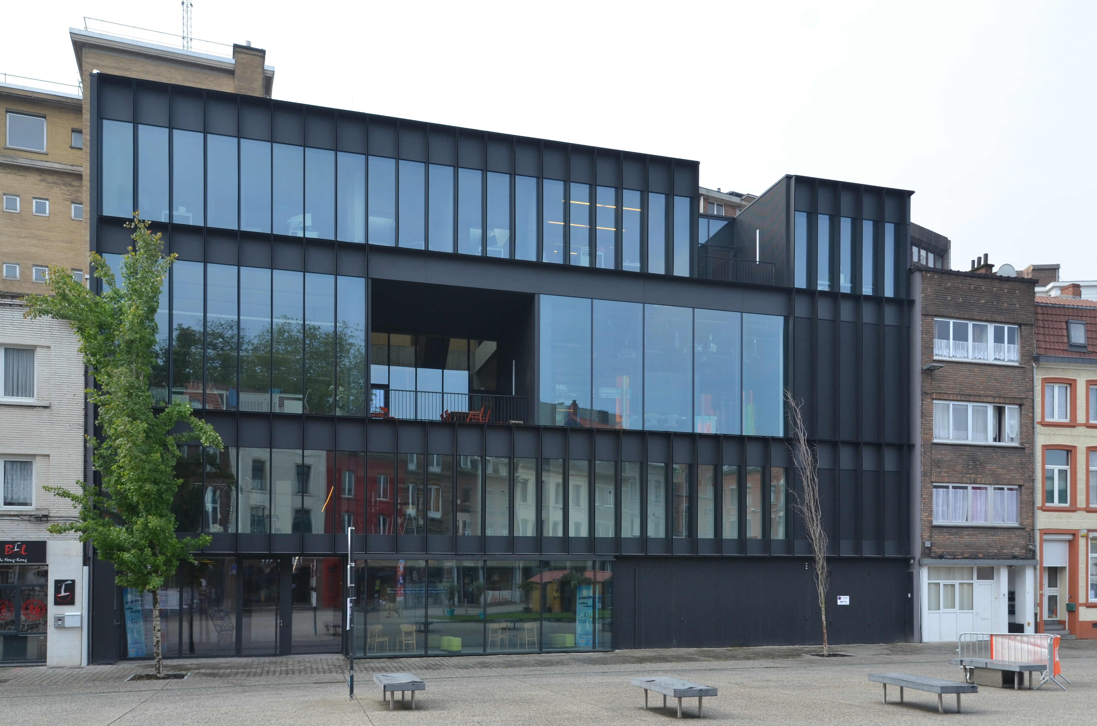 Charleroi (Belgique) - Le bâtiment Médiasambre, situé place de la digue à Charleroi, abrite les équipes de la RTBF et de Télésambre.